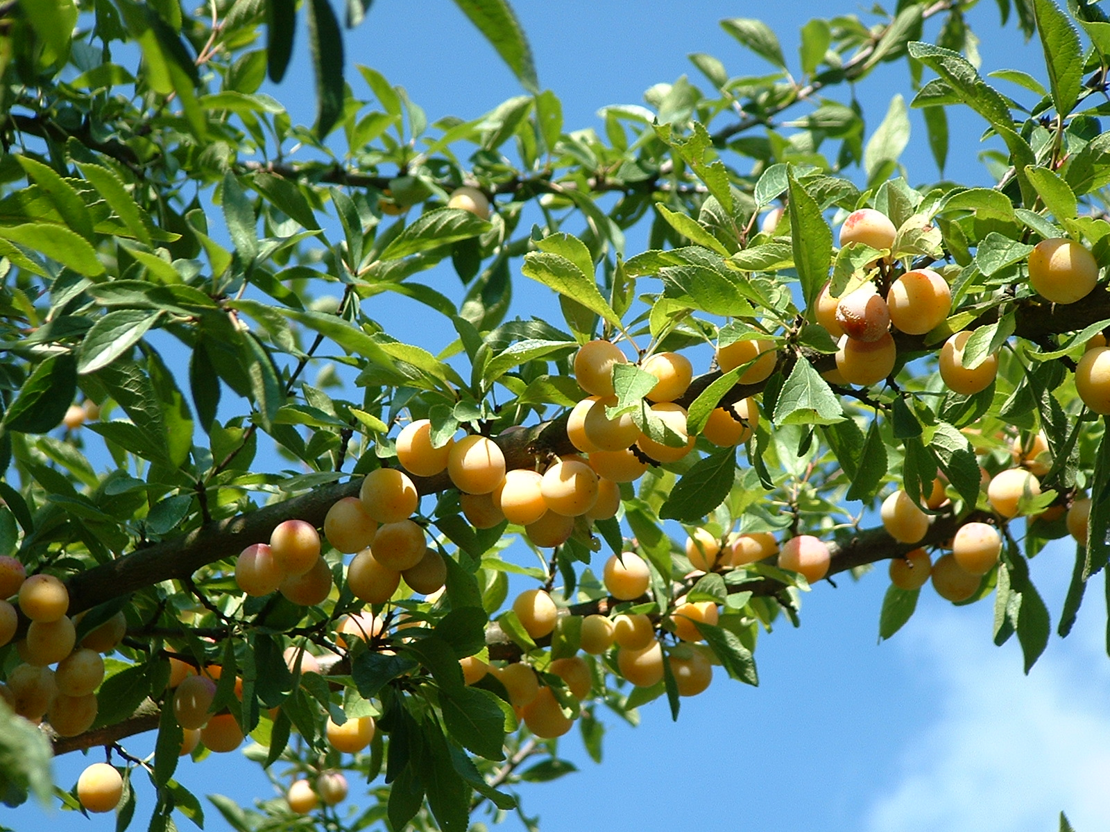 Mirabelles de Lorraine sur l'arbre. Été 2002 / Mirabelles of Lorraine on tree. Summer 2002